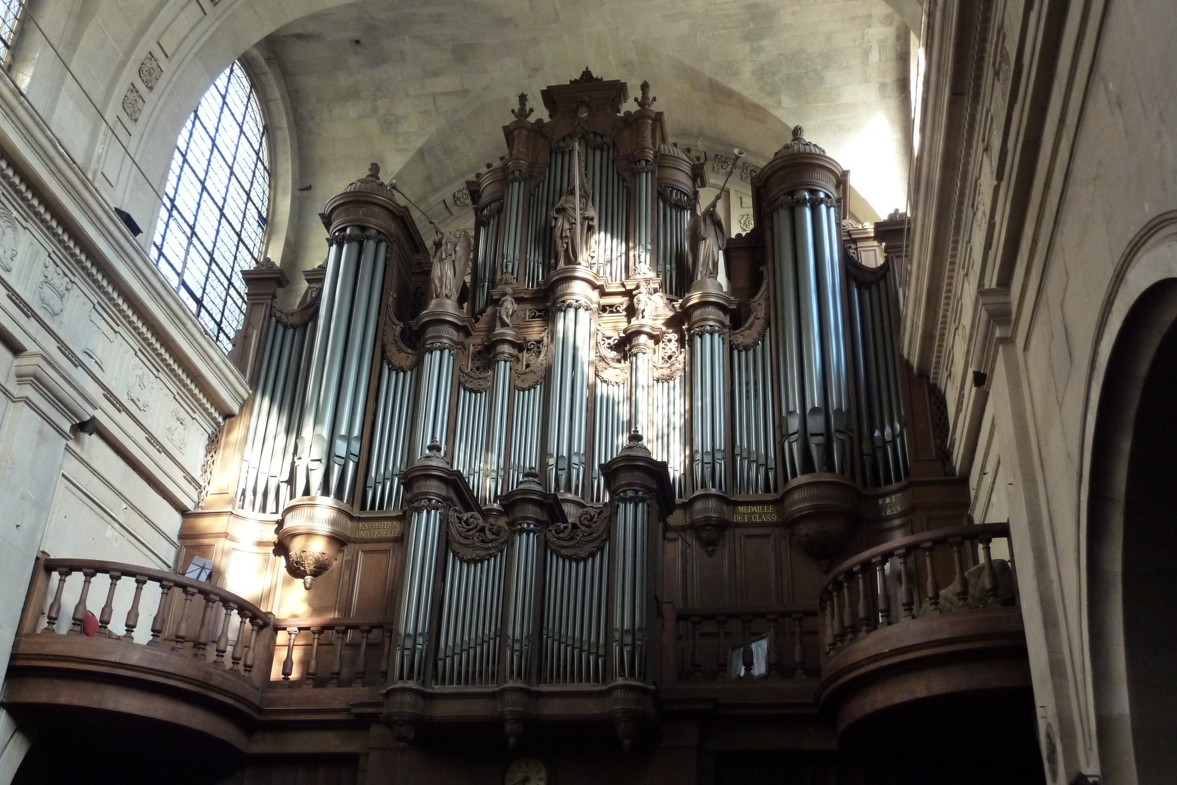 Orgel in der katholischen Pfarrkirche Sainte-Élisabeth-de-Hongrie in Paris (3. Arrondissement)